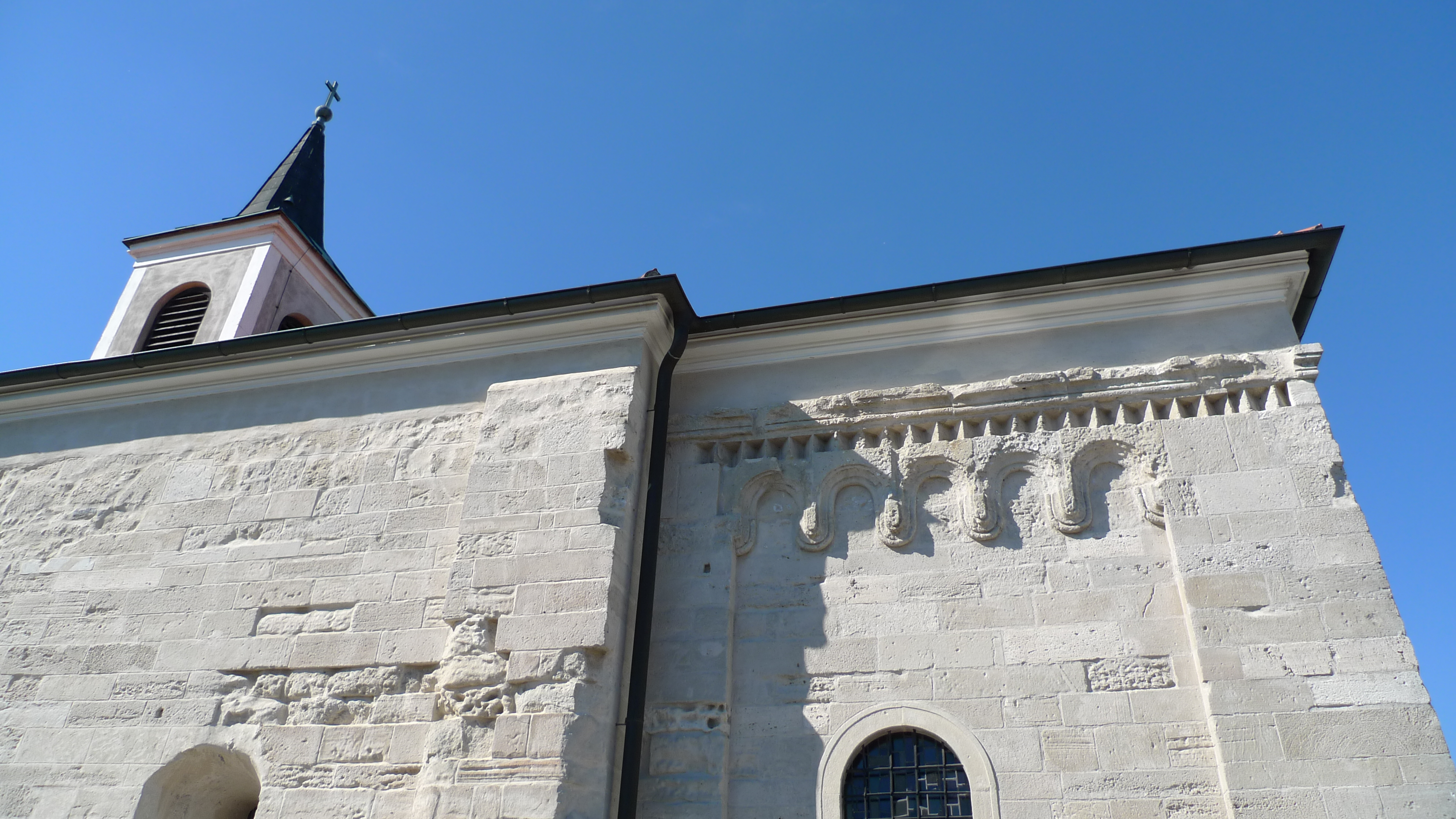 St. Nikolaus in Wildungsmauer, Aussen, Südost